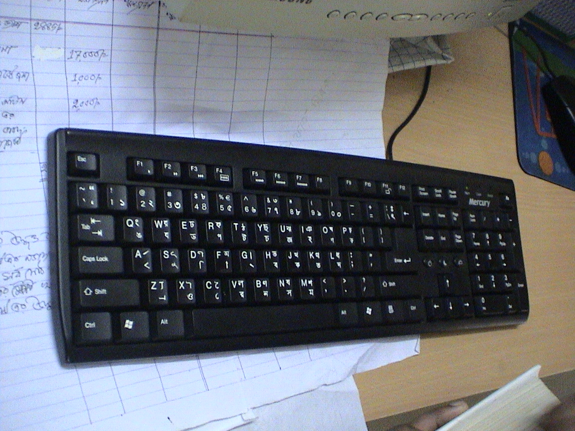 Keyboard. Mamun2a 09:59, 4 September 2006 (UTC)